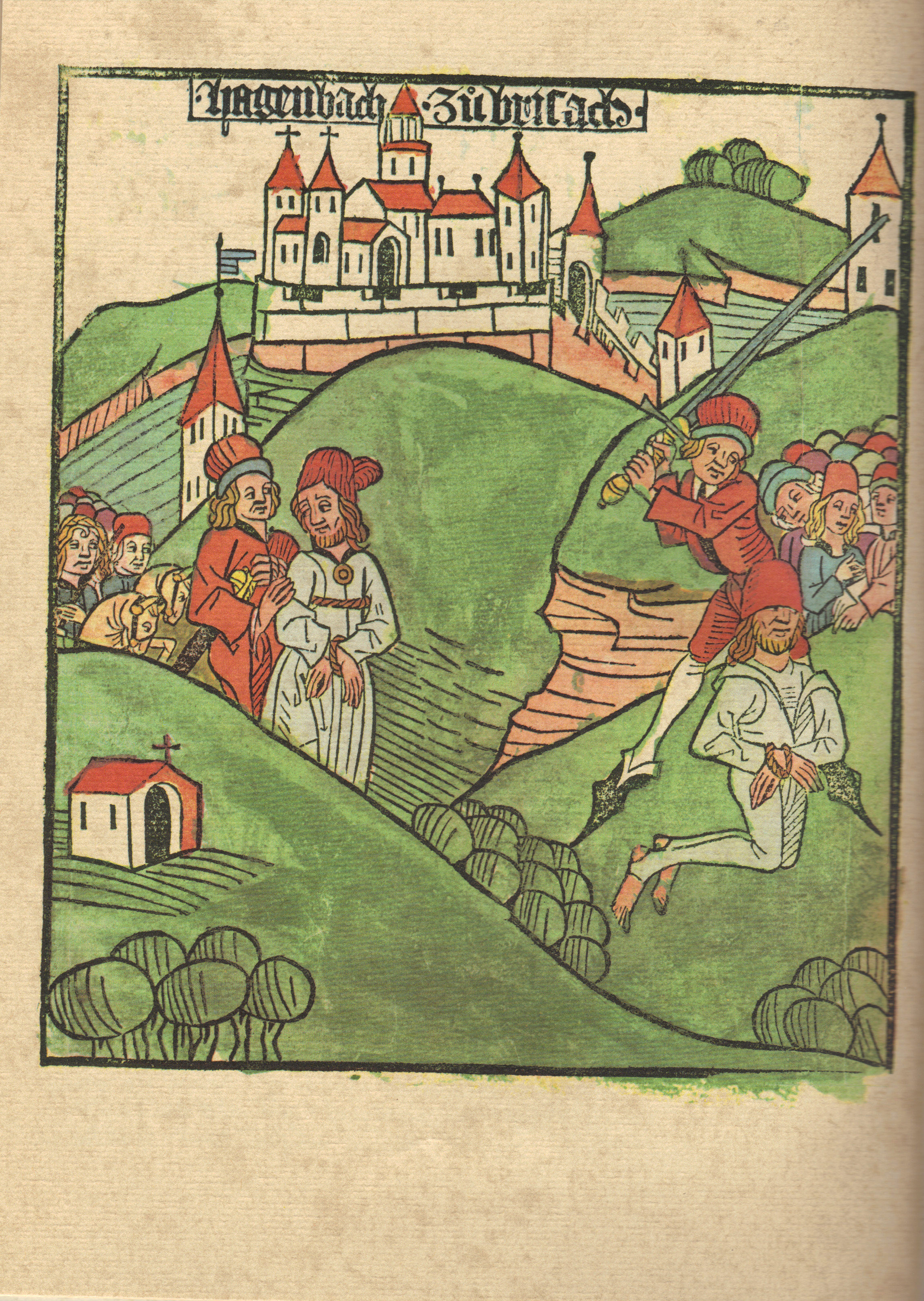 Conradus Pfettisheim: Geschichte Peter Hagenbachs und der Burgunderkriege. Ehemals Inkunabel 265 der F. F. Hofbibliothek Donaueschingen, samt handschriftlichen Zusätzen und deren Transkription